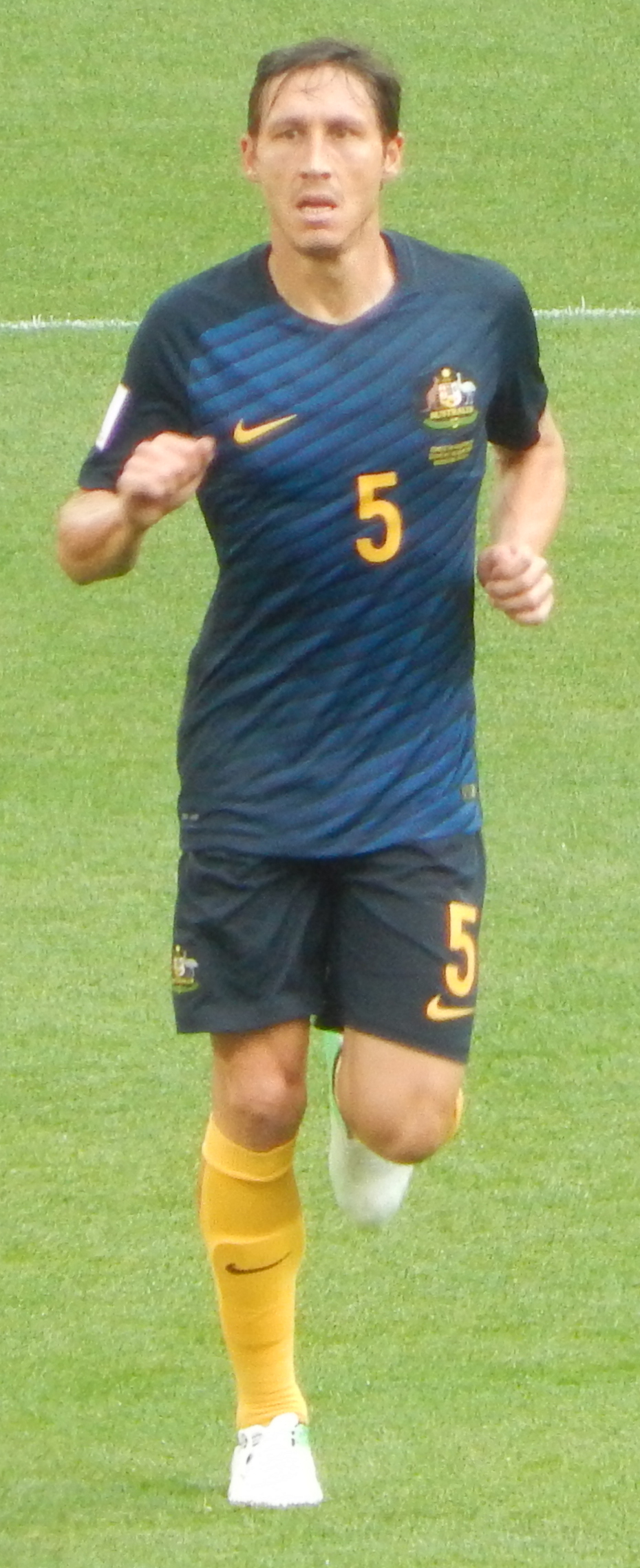 Марк Миллиган Матч Чили – Австралия